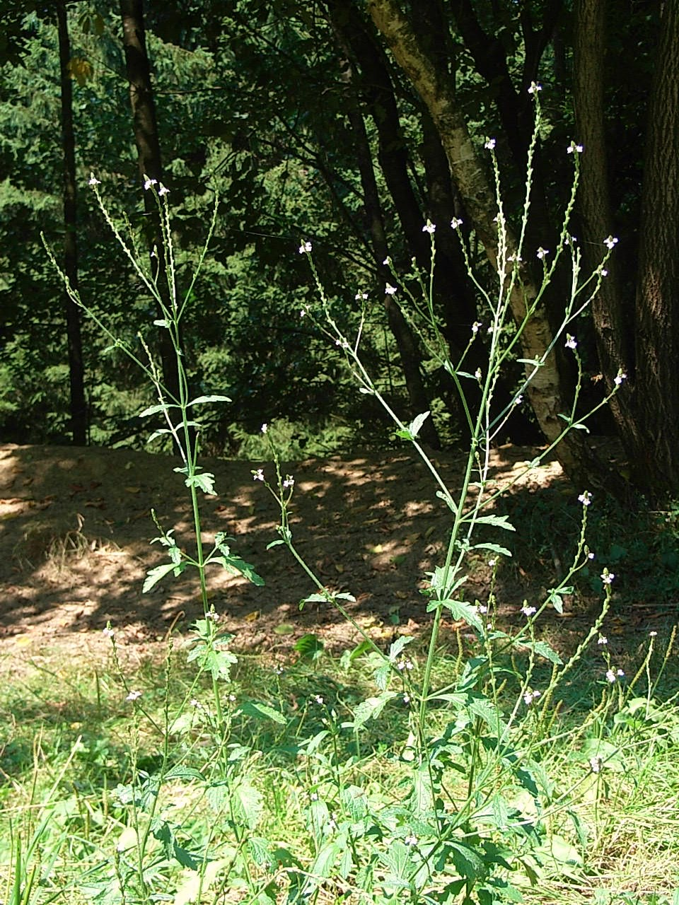 Eisenkraut im Landschaftsschutzgebiet Kohlbruck in Passau